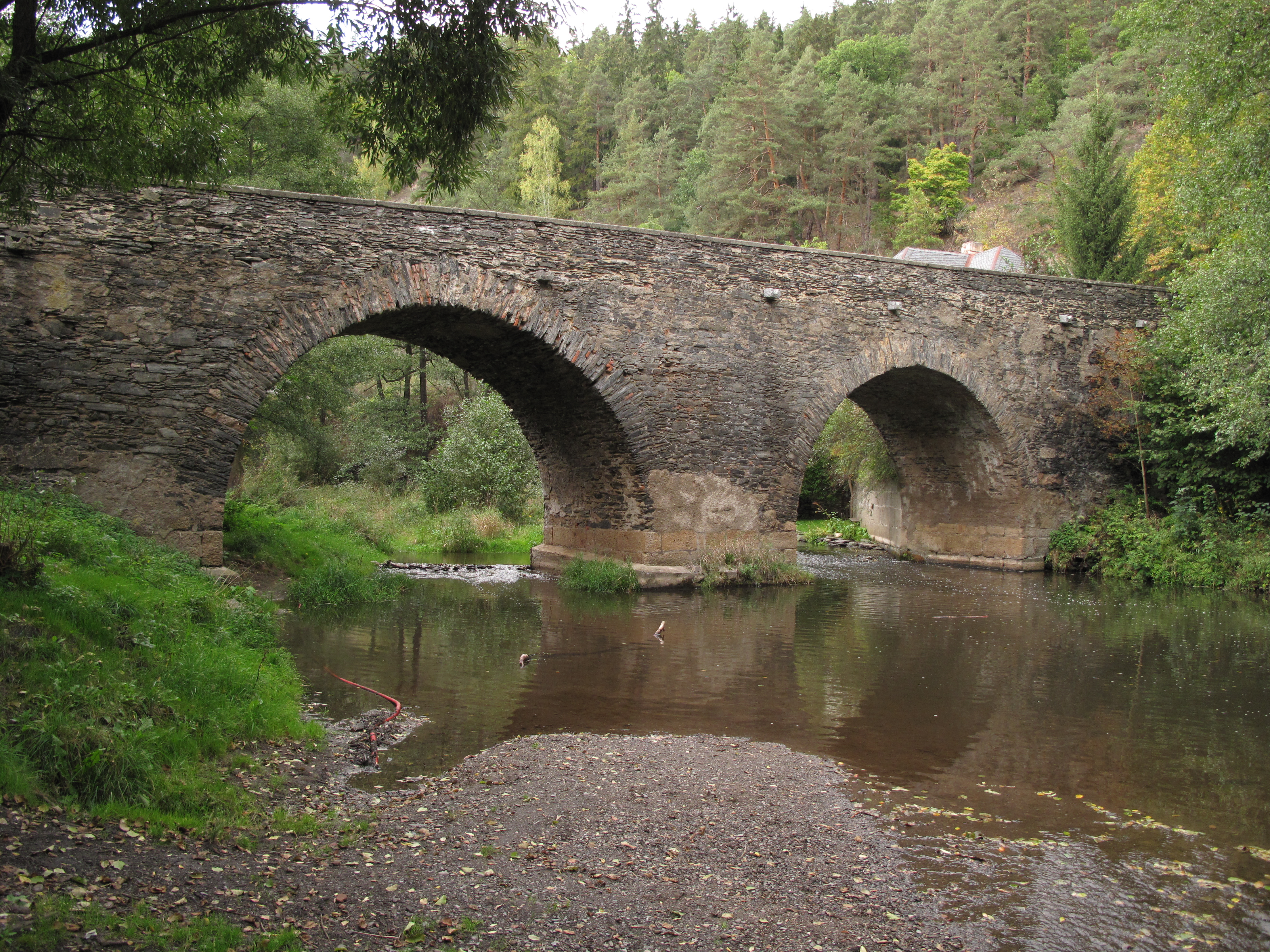 Oblouky kamenného mostu v Rabštejně nad Střelou. Okres Plzeň-sever, Česká republika.